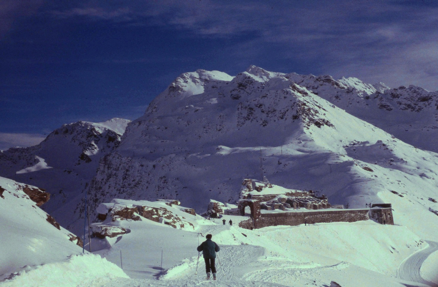 Savoie La Rosiere La Traversette 121994